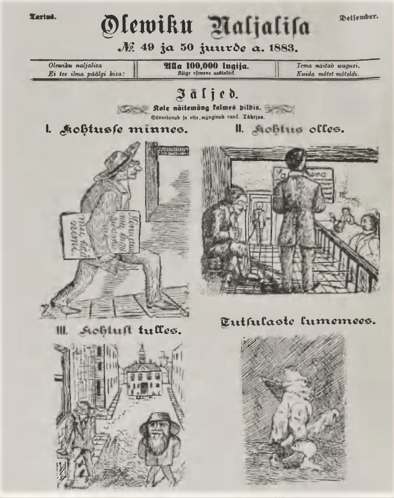 Oleviku Naljalisa 1883 esikaas